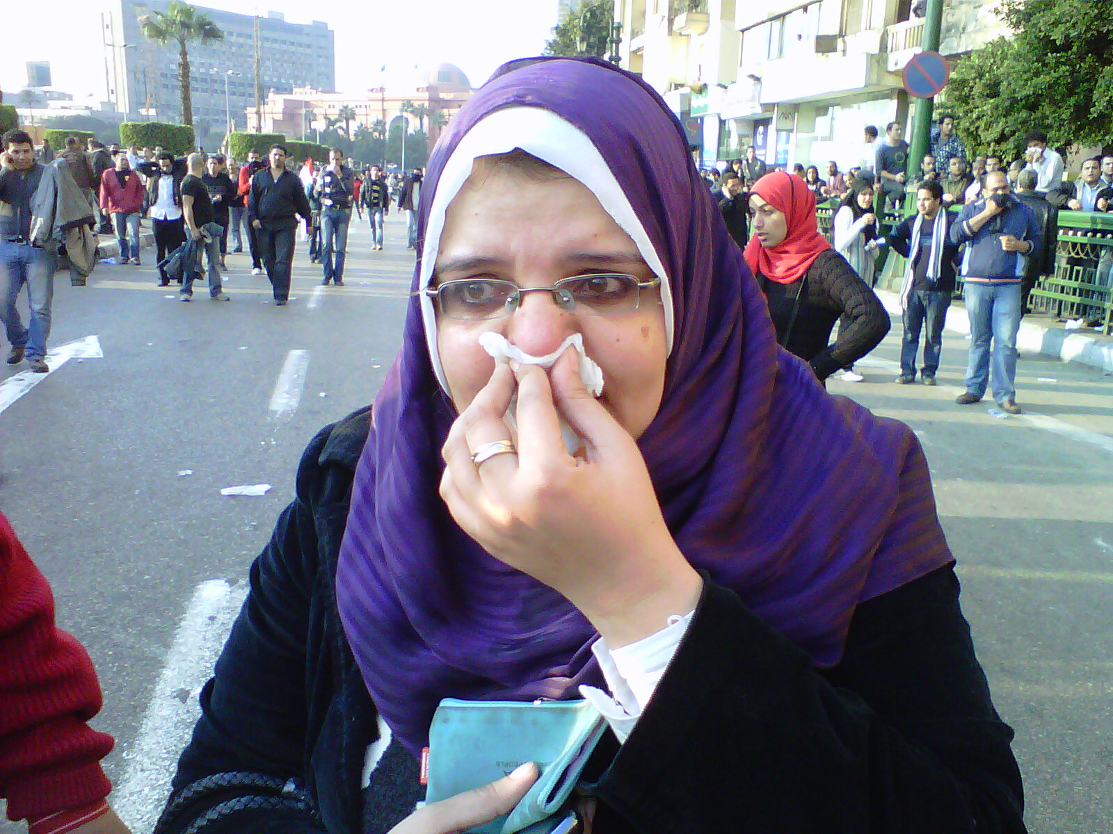 IMG00109-20110125-1615